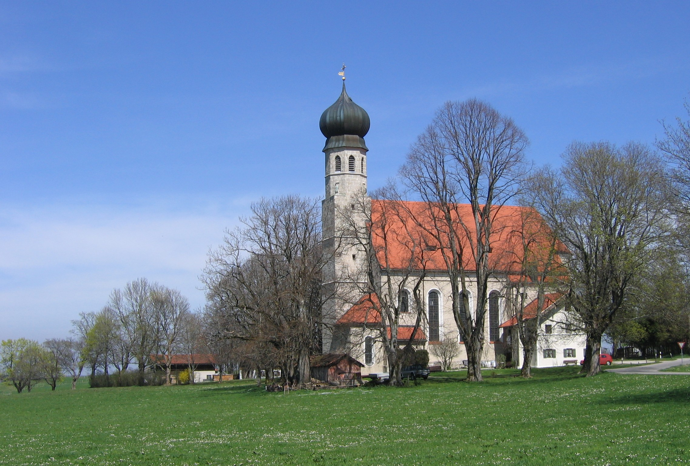 Allerheiligenkirche in Warngau, Oberbayern